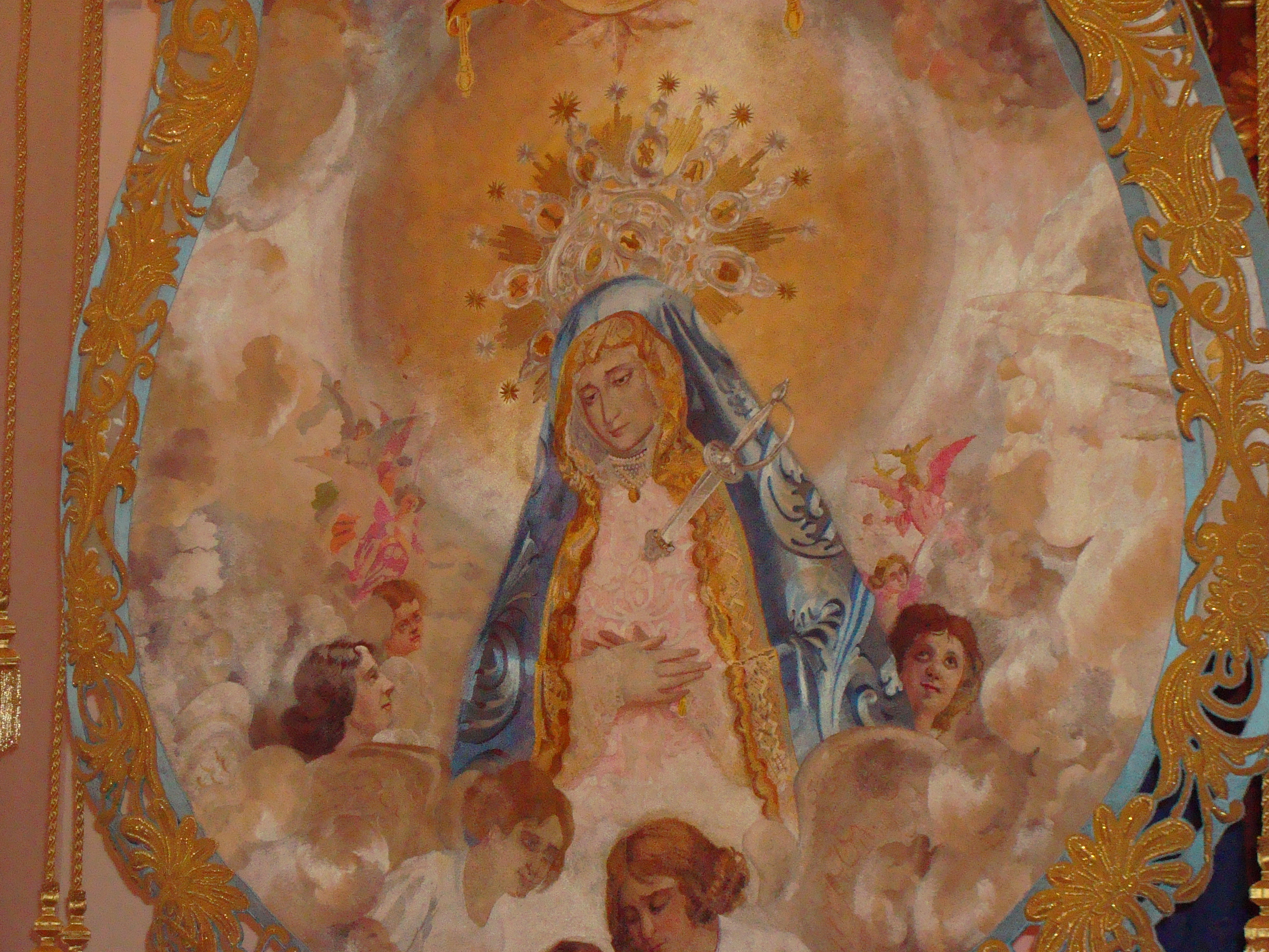 Estandarte de la Virgen de los Dolores, patrona del Paso Azul, Semana Santa de Lorca.